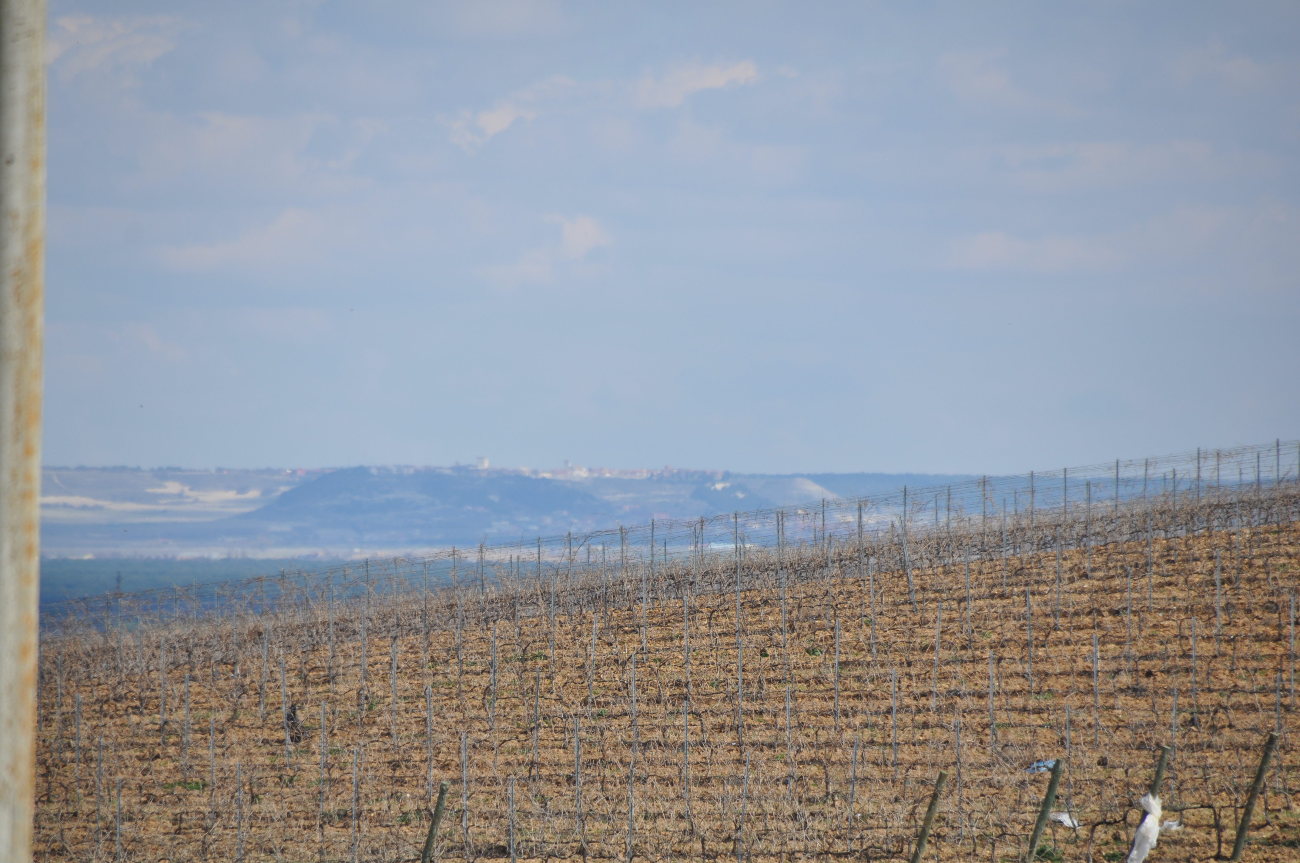 Viñedos en Ventosa de la Cuesta, Valladolid (España).